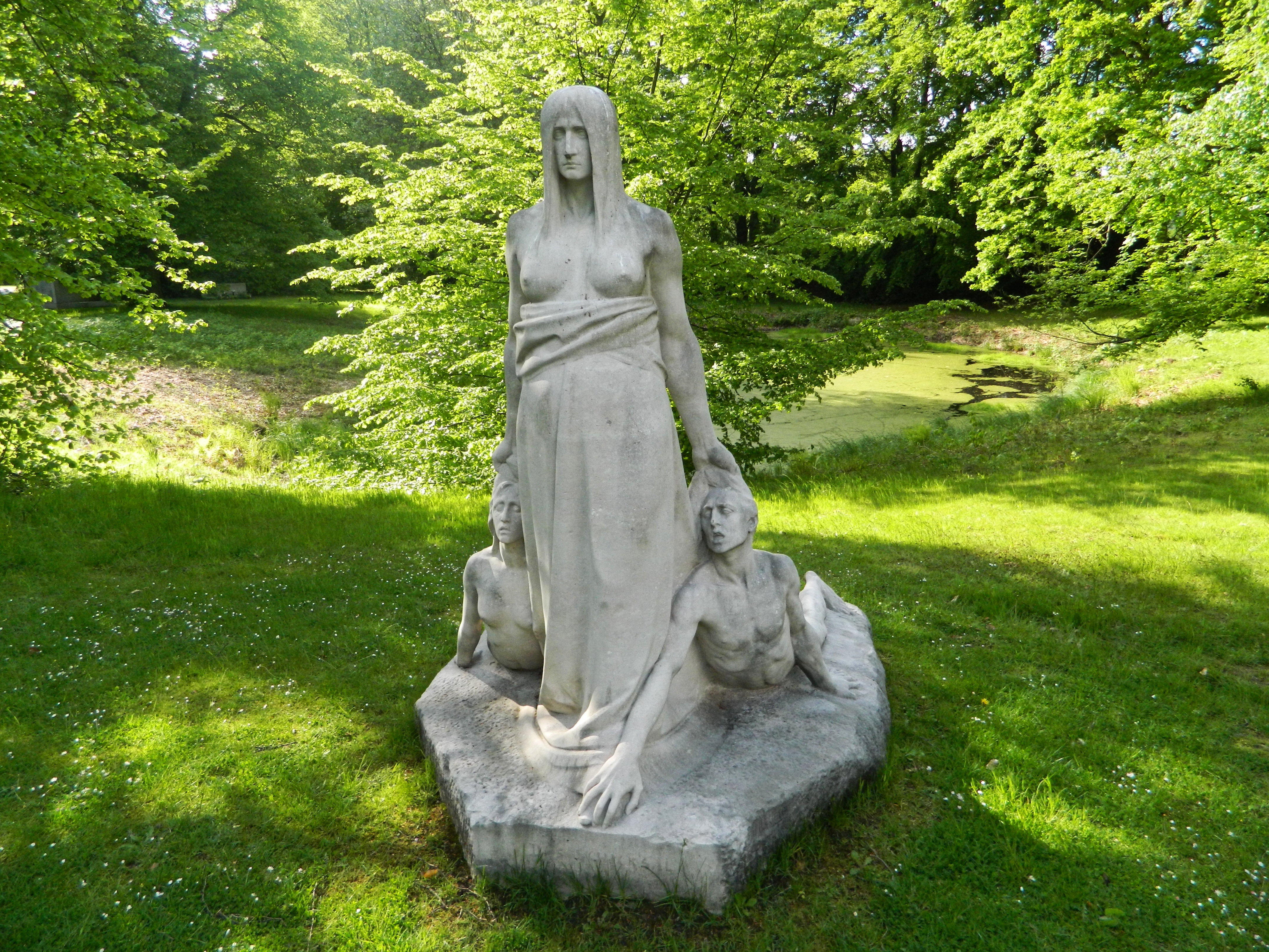 Ohlsdorf, Hamburg, Germany